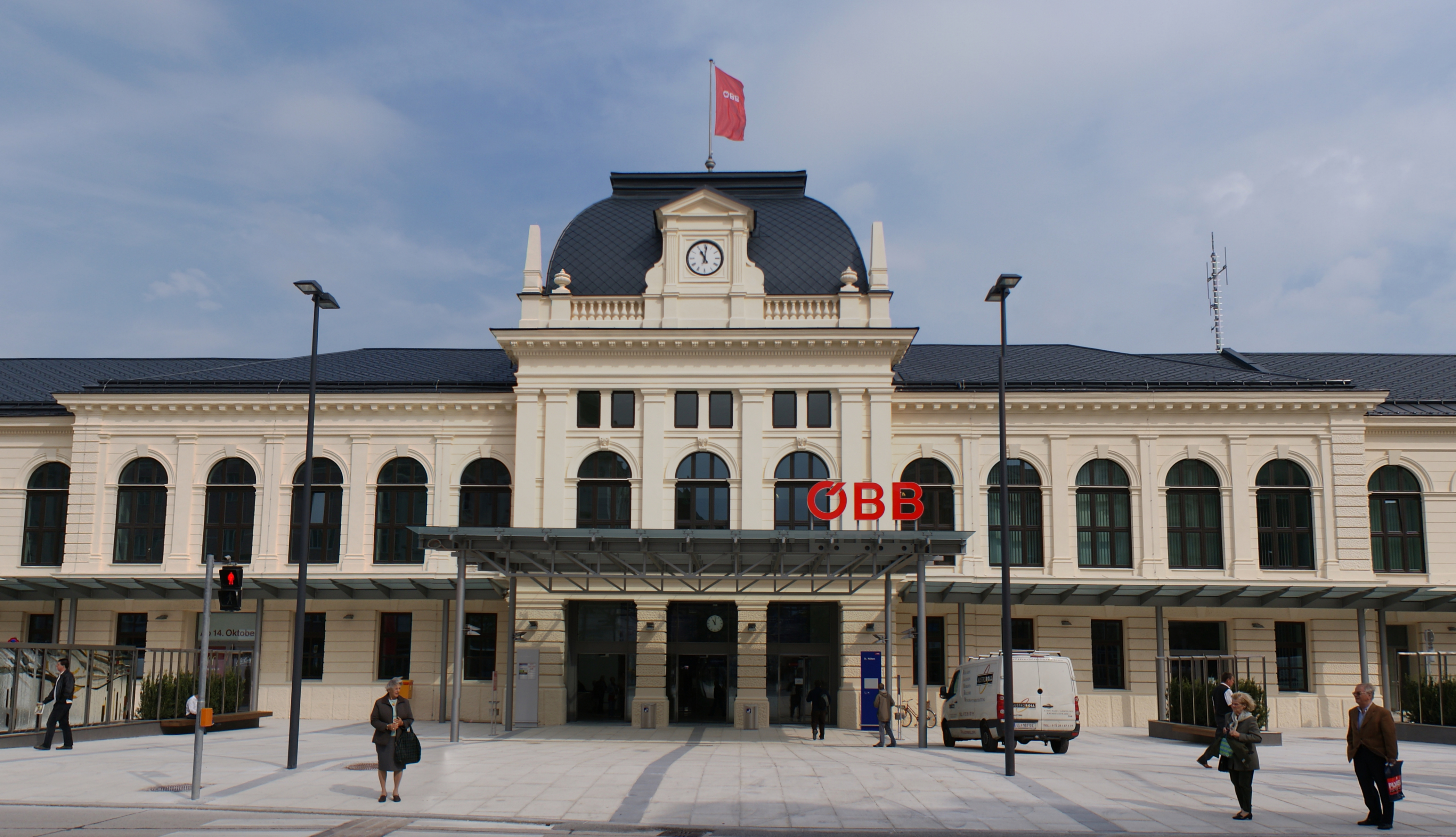 Der St. Pöltner Hauptbahnhof nach dem Umbau im September 2010